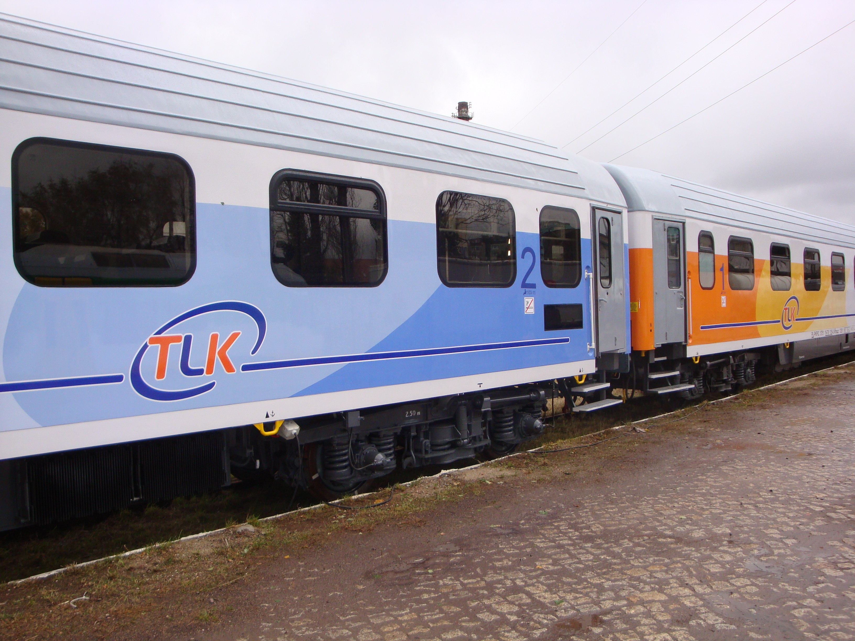 Zmodernizowane wagony w nowym malowaniu TLK należące do PKP Intercity i prezentowanego podczas targów kolejnictwa "Trako" w Gdańsku.